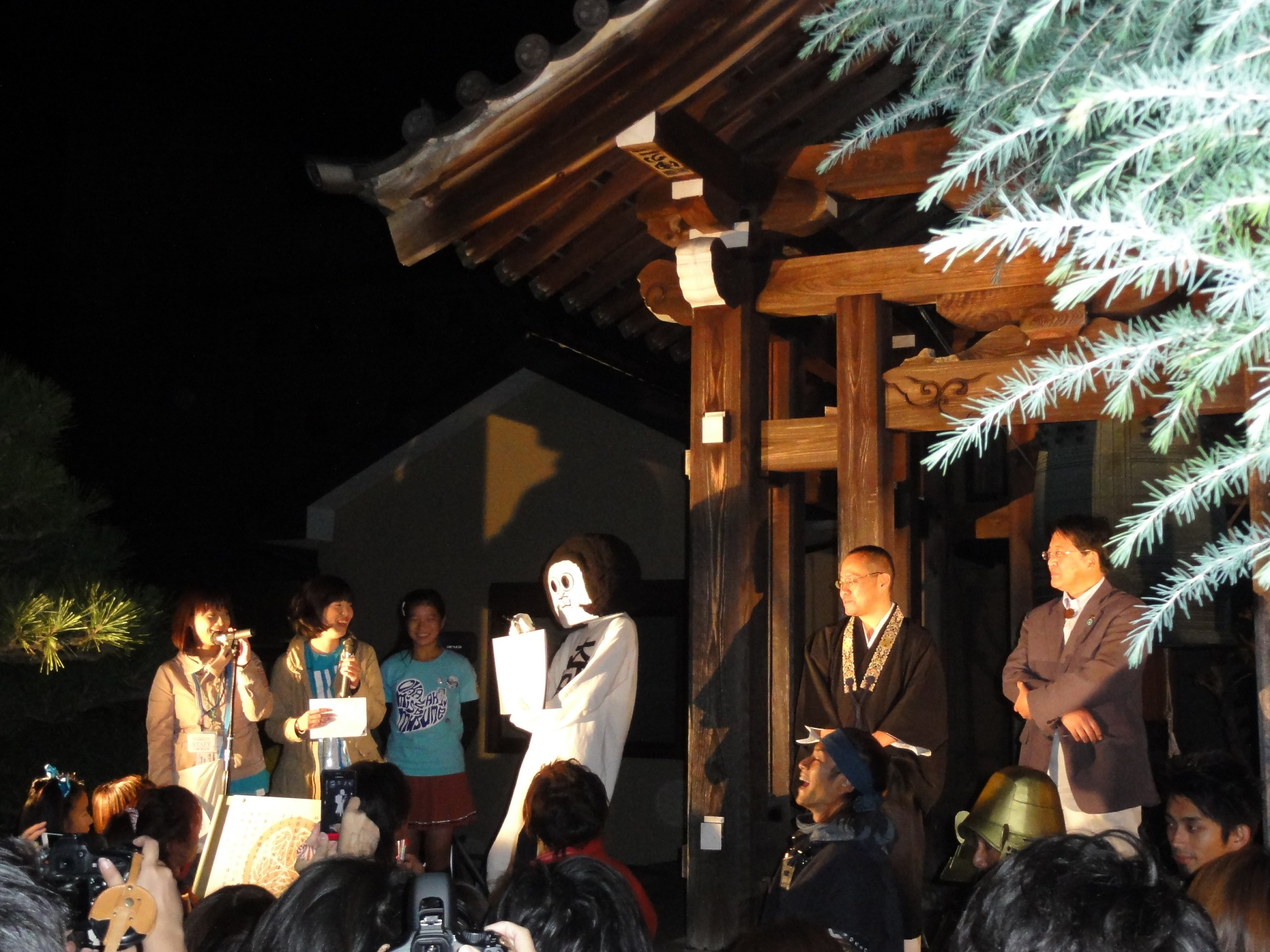 あいちトリエンナーレ2013、松本町会場、松応寺にて。